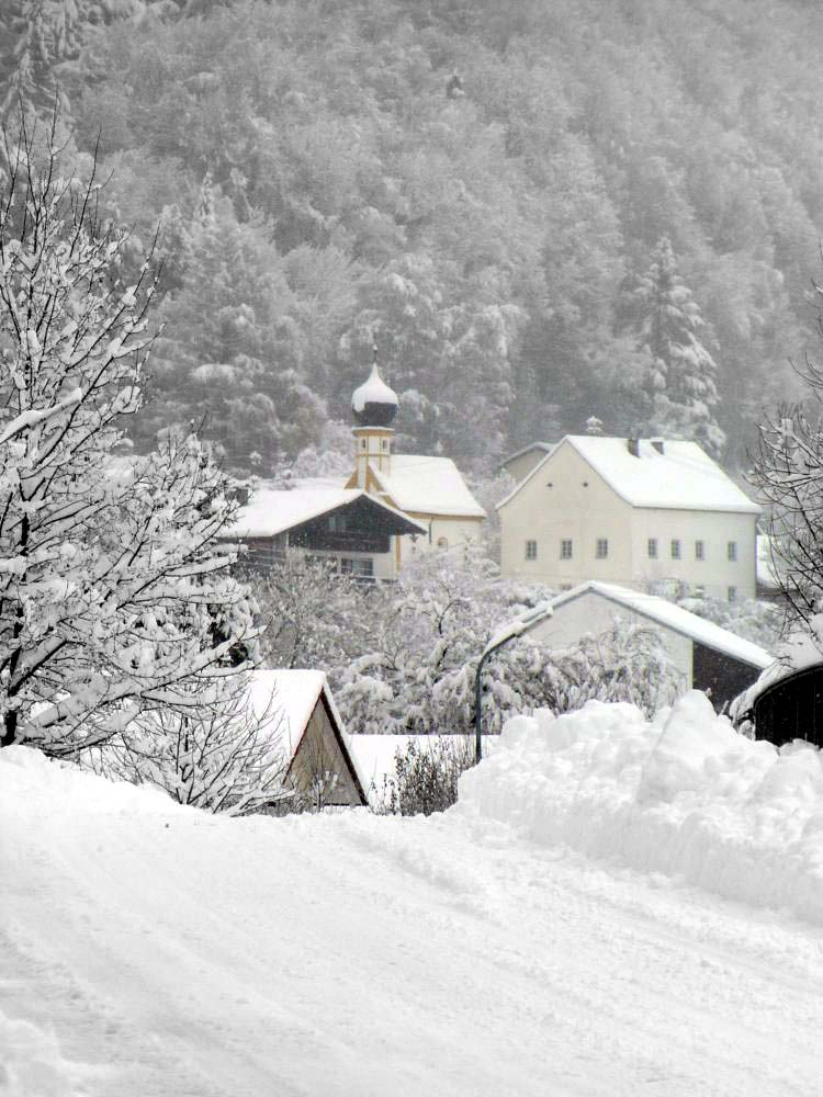 Blick auf die Burger Kapelle von der Steinhöringer Isenbrücke aus; Winhöring, Bayern